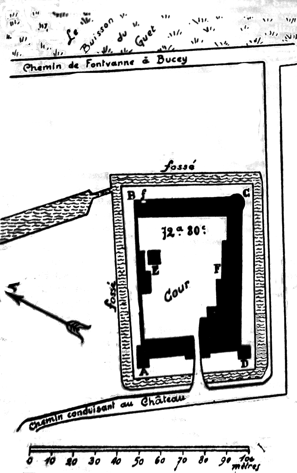 image de cf. le titre